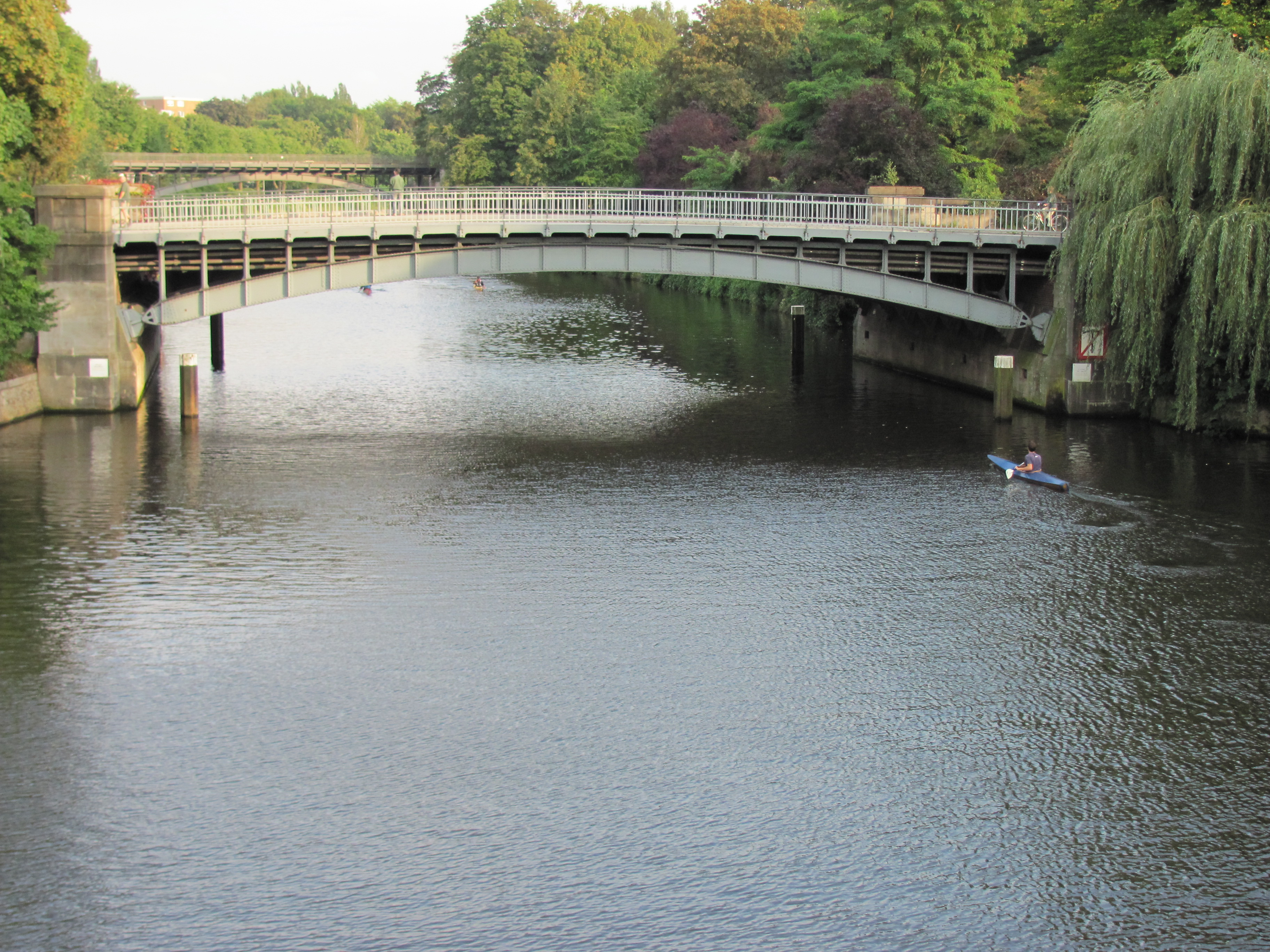 Winterhuder Brücke in Hamburg, von Norden gesehen